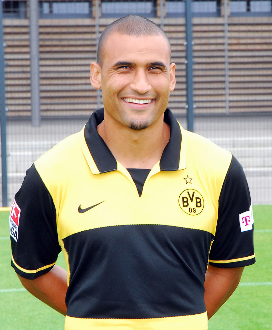 Delron Buckley bei der Mannschaftsvorstellung 2007